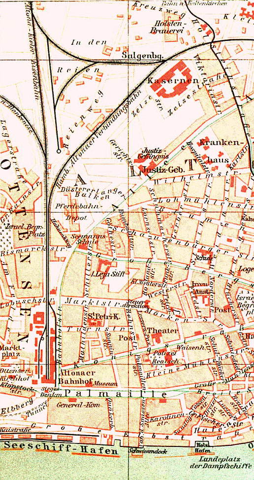 Die Umgebung des Bahnhofes in Altona